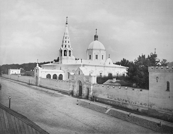 Храм Воздвижения Честного Животворящего Креста Господня (Ново-Алексеевский монастырь)